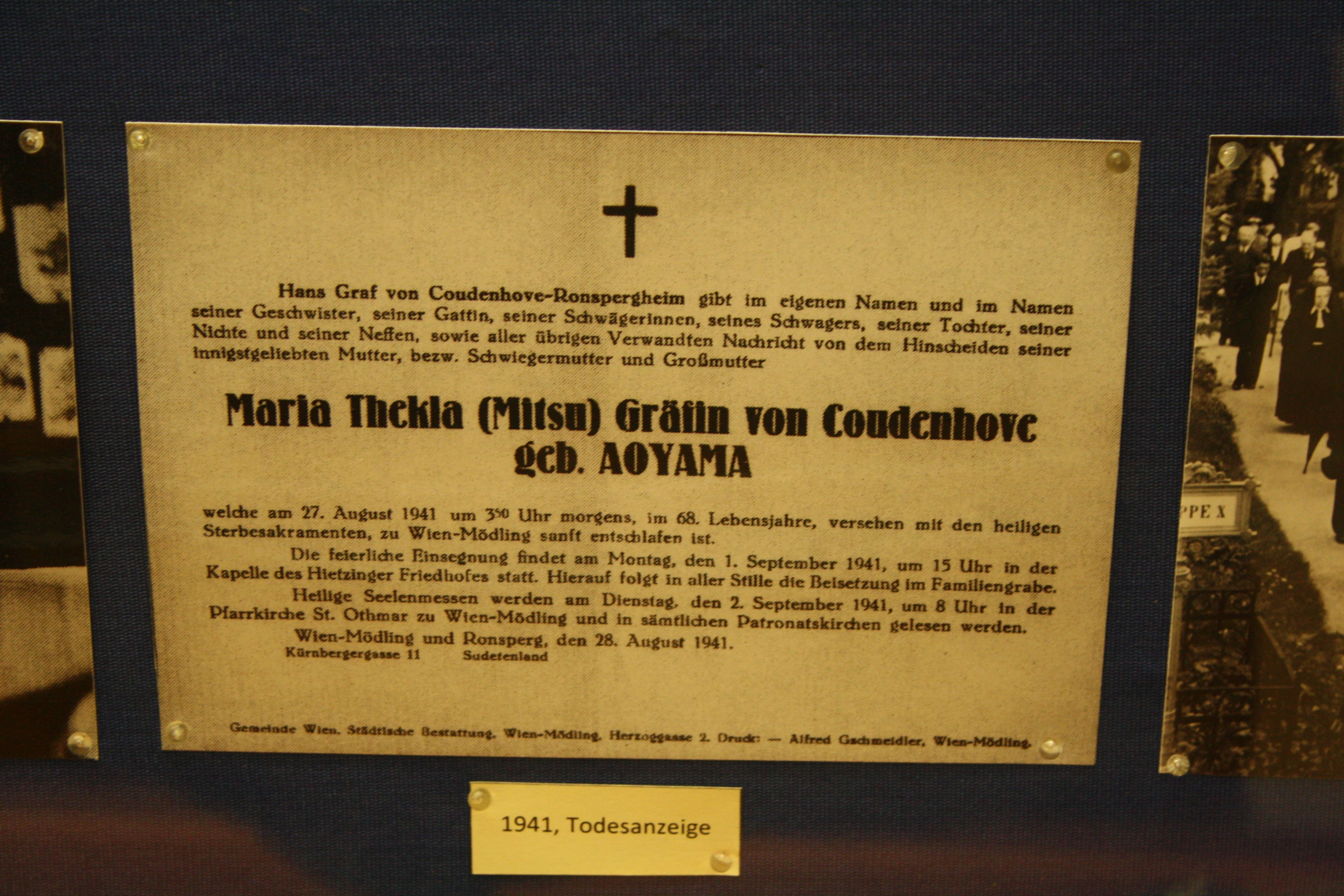 Todesanzeige von Mitsuko Coudenhove-Kalergi im Heimatmuseum Mödling